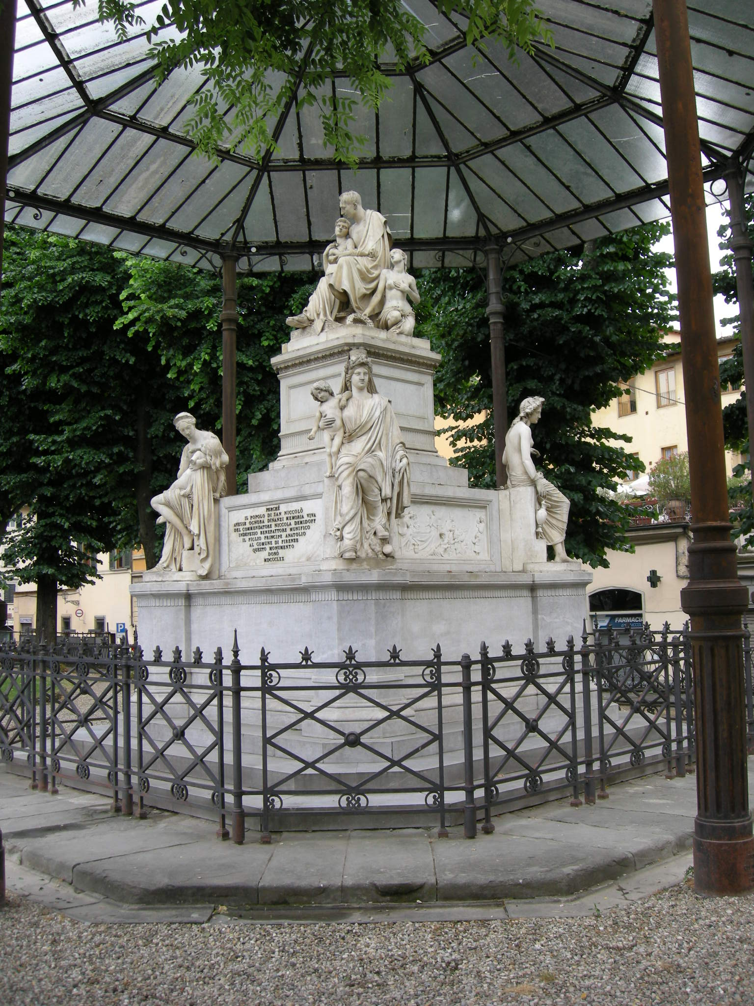 Monument to Nicola Demidoff (Florence)